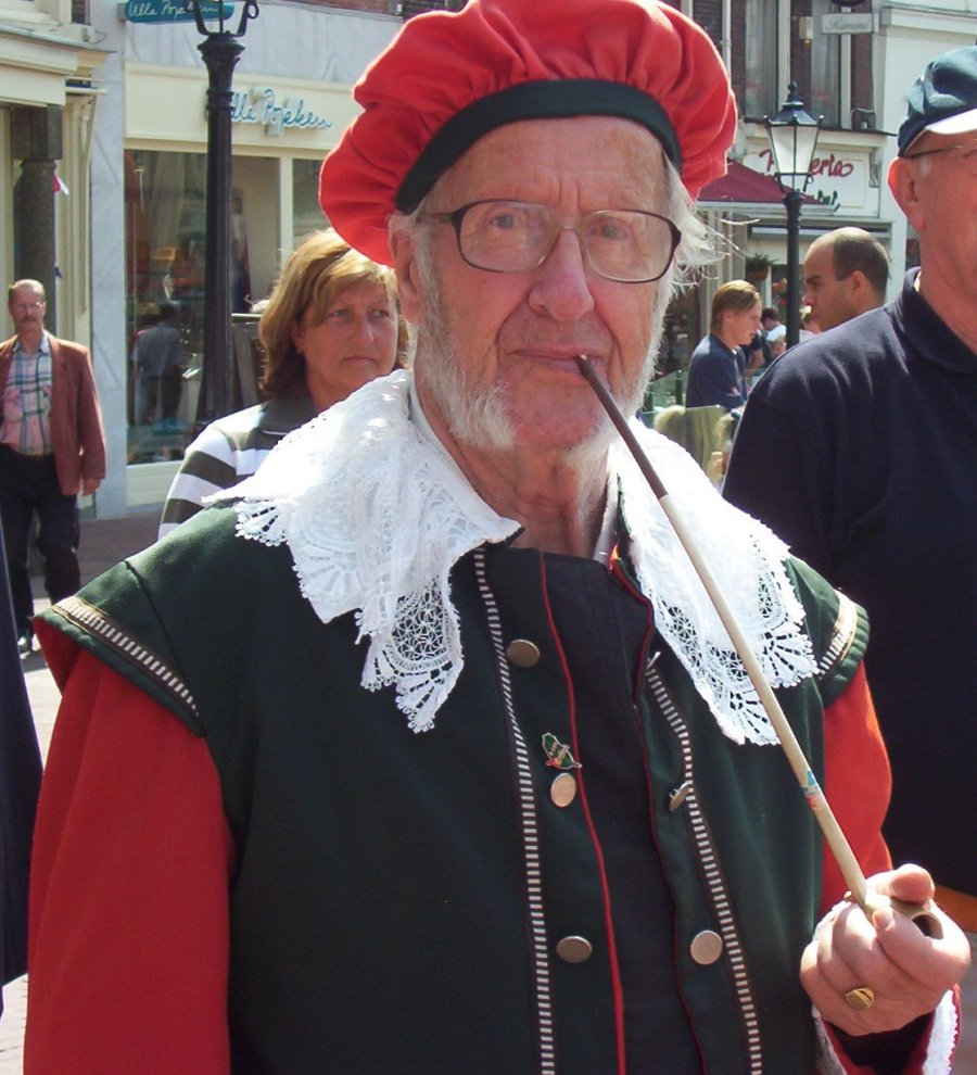 Gouwenaar met Goudse stenen pijp, eigen foto gebruik vrij Categorie:Tabak